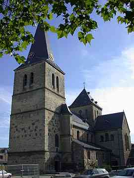 Church "St. Pankratius" in Heerlen